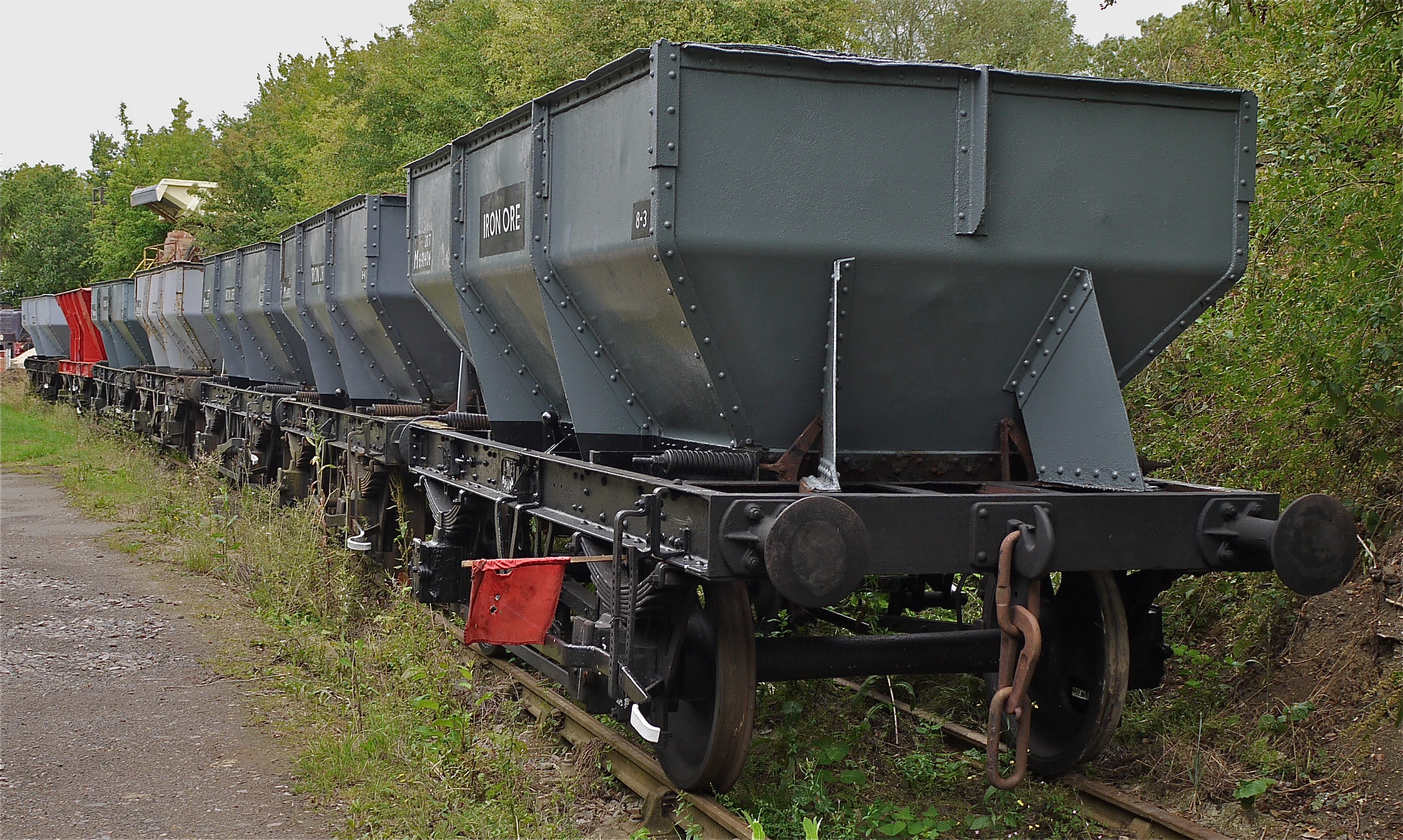 Panasonic G1 14-45 Lens